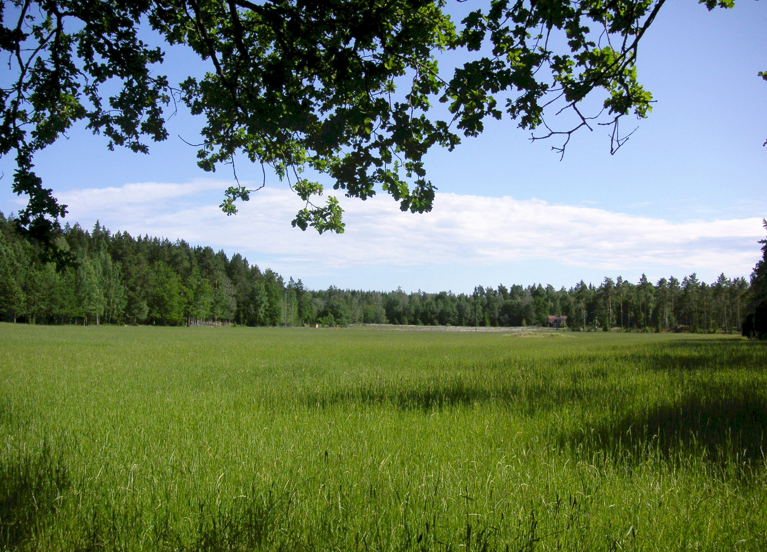 Kulturlandskapet på Adelsön